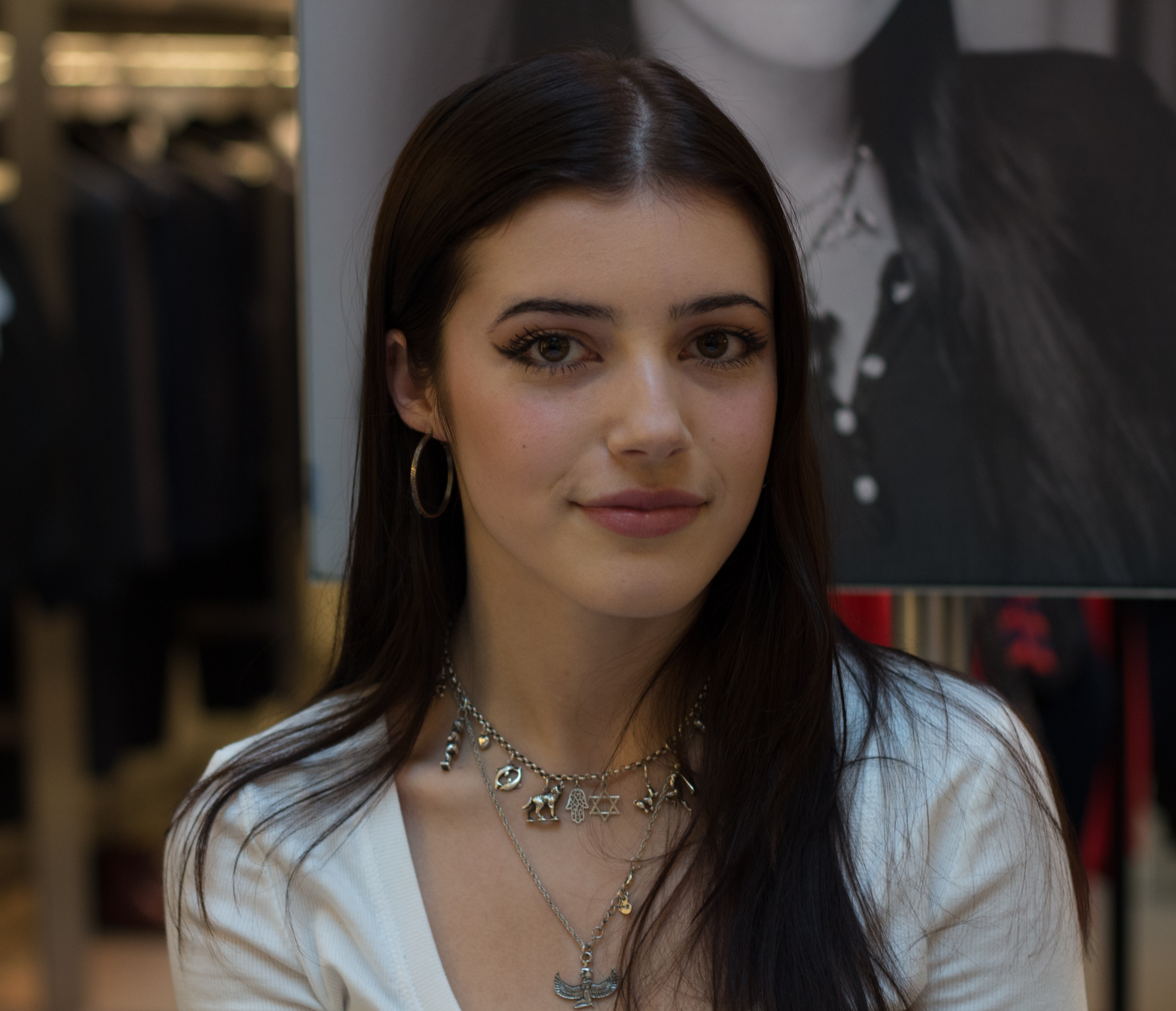 Solomonica de Winter